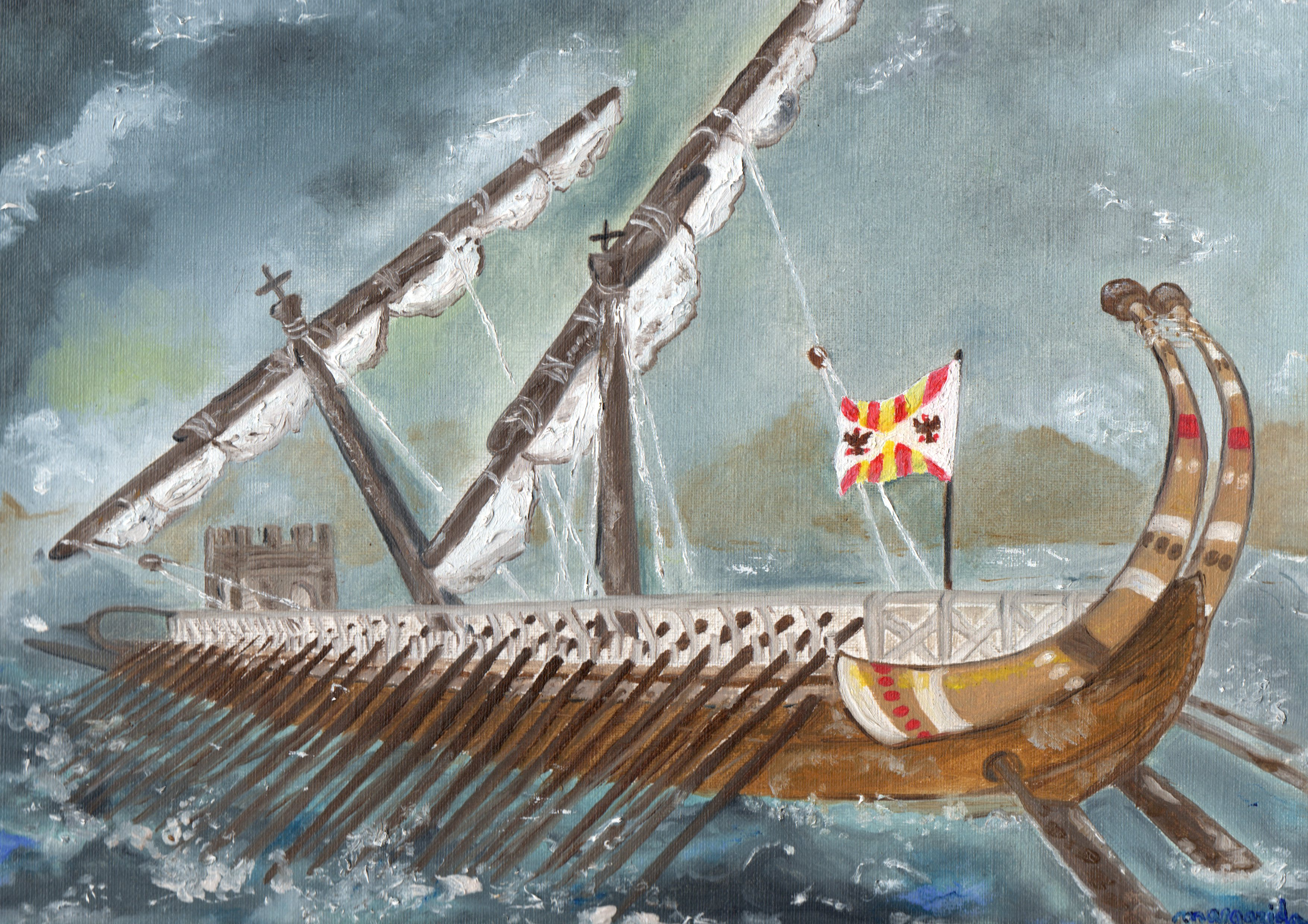 Galera corsària "Oliveta" any 1302. De construcció genovesa, aquesta nau va ser capitanejada per Roger de Flor. Amb una patent de cors atorgada per Frederic II de Sicília, Roger de Flor castigaria els vaixells de Carles II de Nàpols. Oli basat en l'obra de Sandra Delgado publicada a la revista Desperta Ferro nº22.